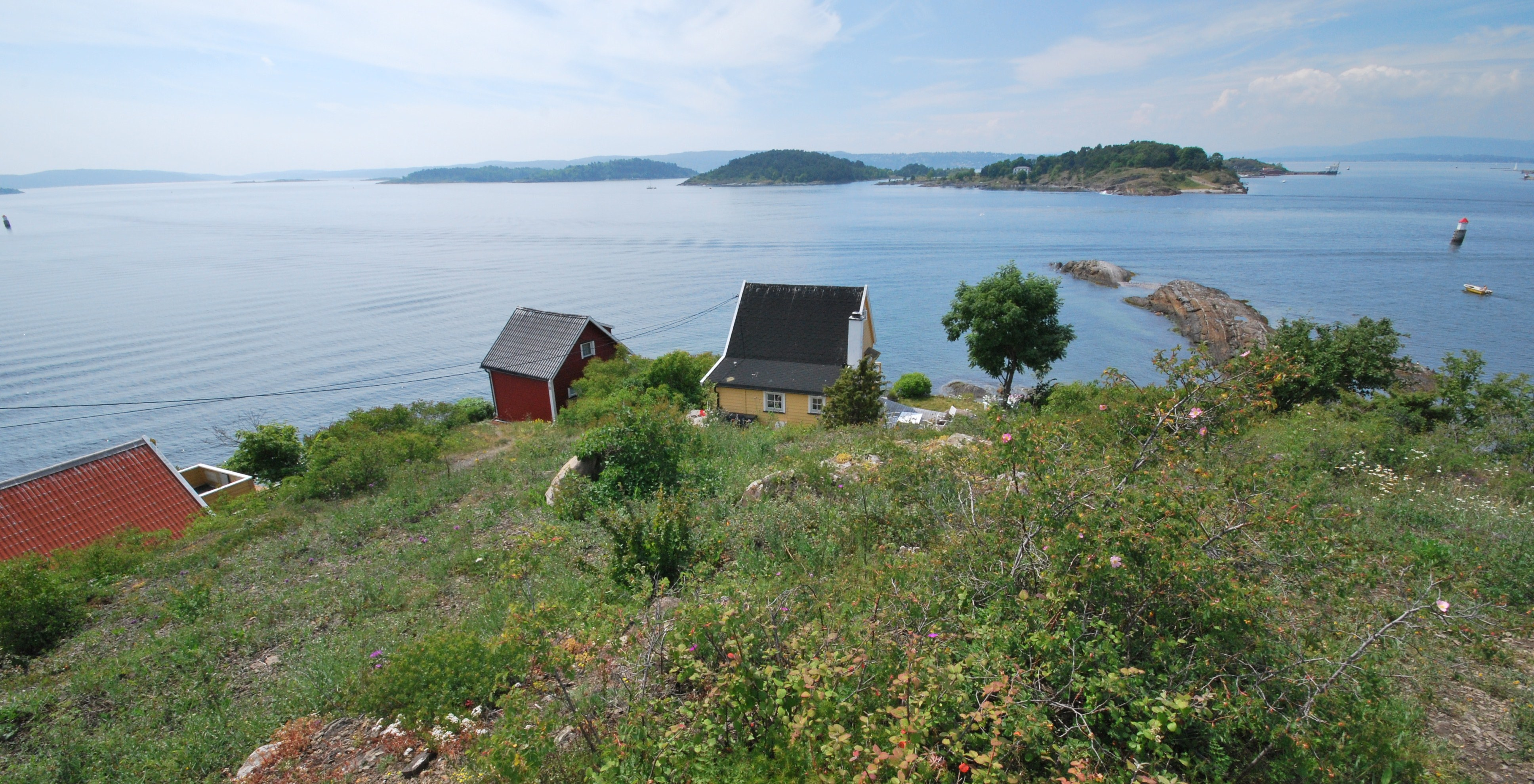 Sydspissen av Bleikøya og Daggerskjær. I bakgrunnen Gressholmen.